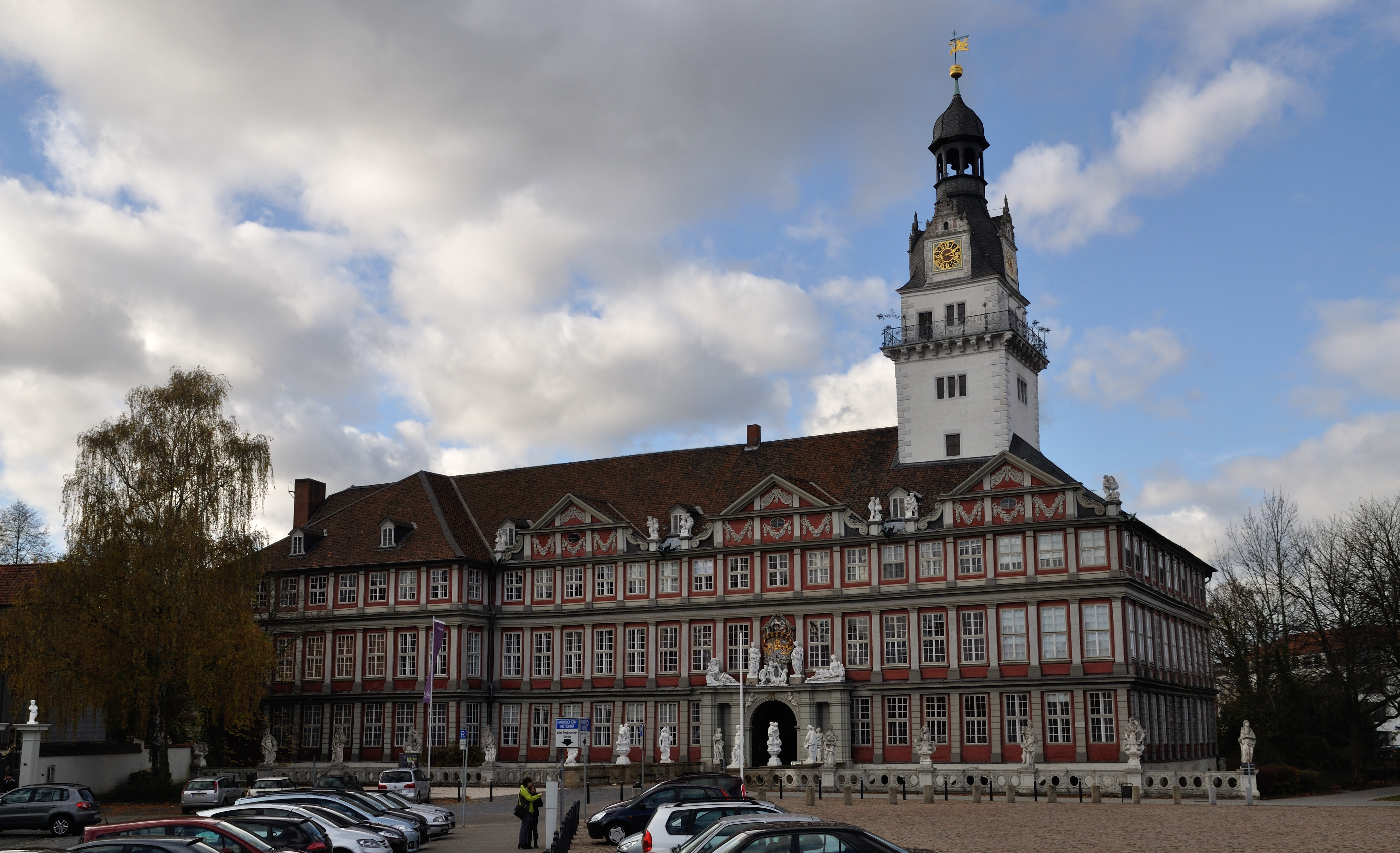 Residenzschloss Wolfenbüttel der Herzöge zu Braunschweig und Lüneburg This is a photograph of an architectural monument.It is on the list of cultural monuments of Wolfenbüttel